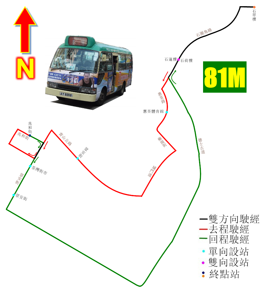 中文（香港）: 新界專線剃巴81M線的走線圖